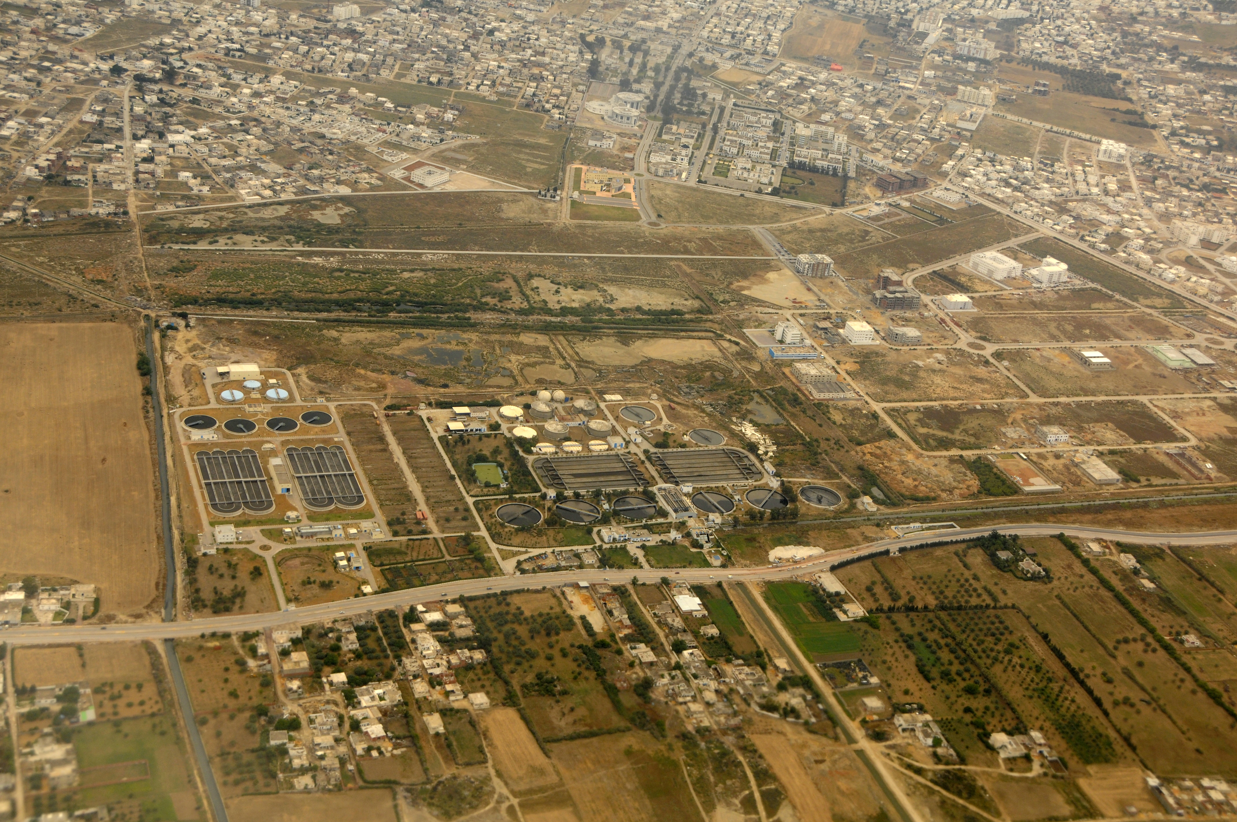 Vue aérienne de la station d'épuration des eaux usées de l'ONAS au nord de Tunis (entre Chotrana et Bou Jaafar).